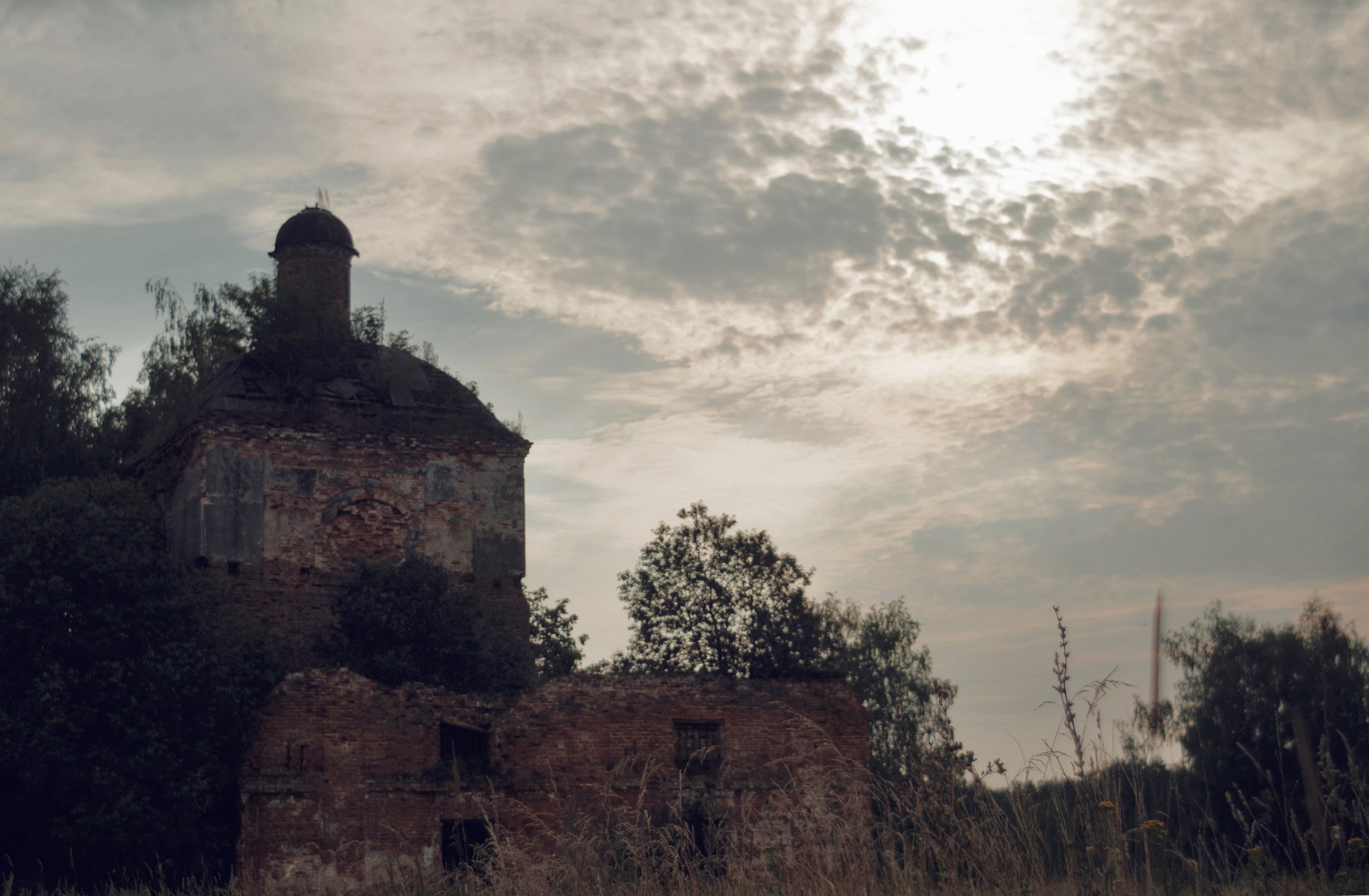 Церковь Иоанна Предтечи в с. Аннино Суздальского района Владимирской области